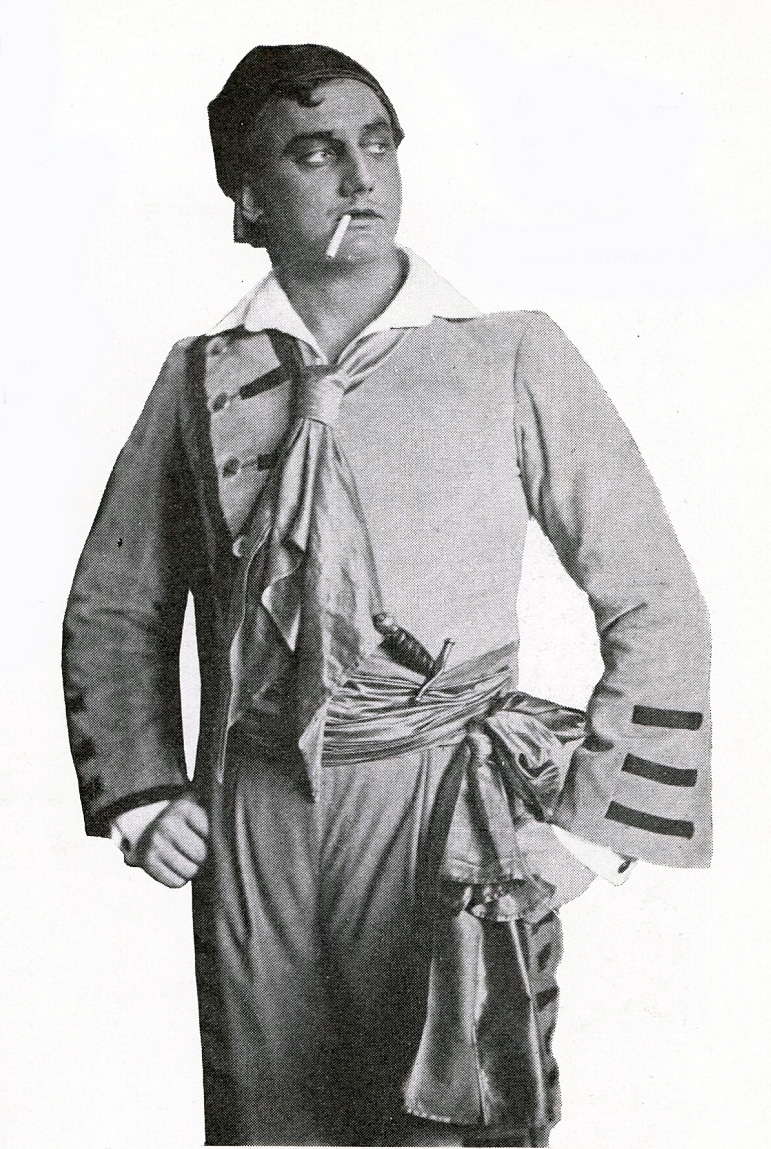 Einar Beyron (1901-1979) som Turrindo i På Sicilien. Foto i Scenen 1927.